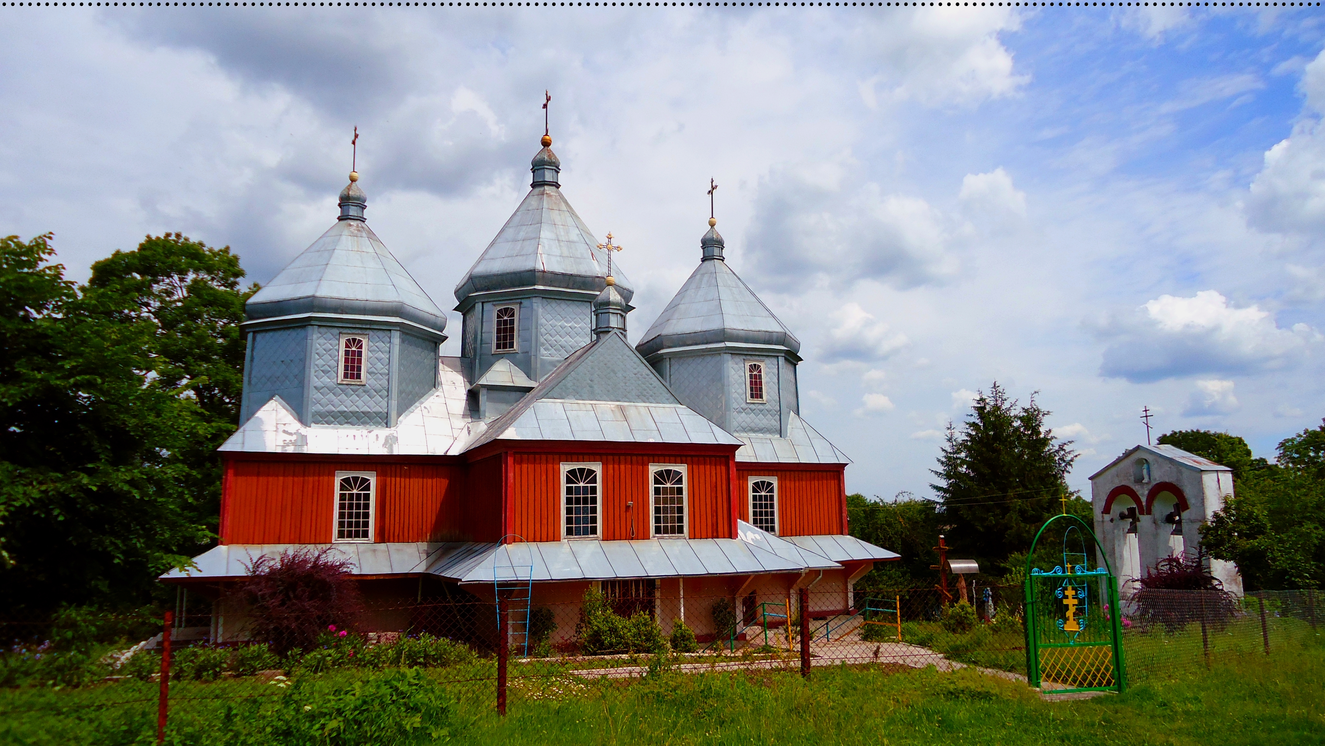 Храм з південної сторони з дзвіницею